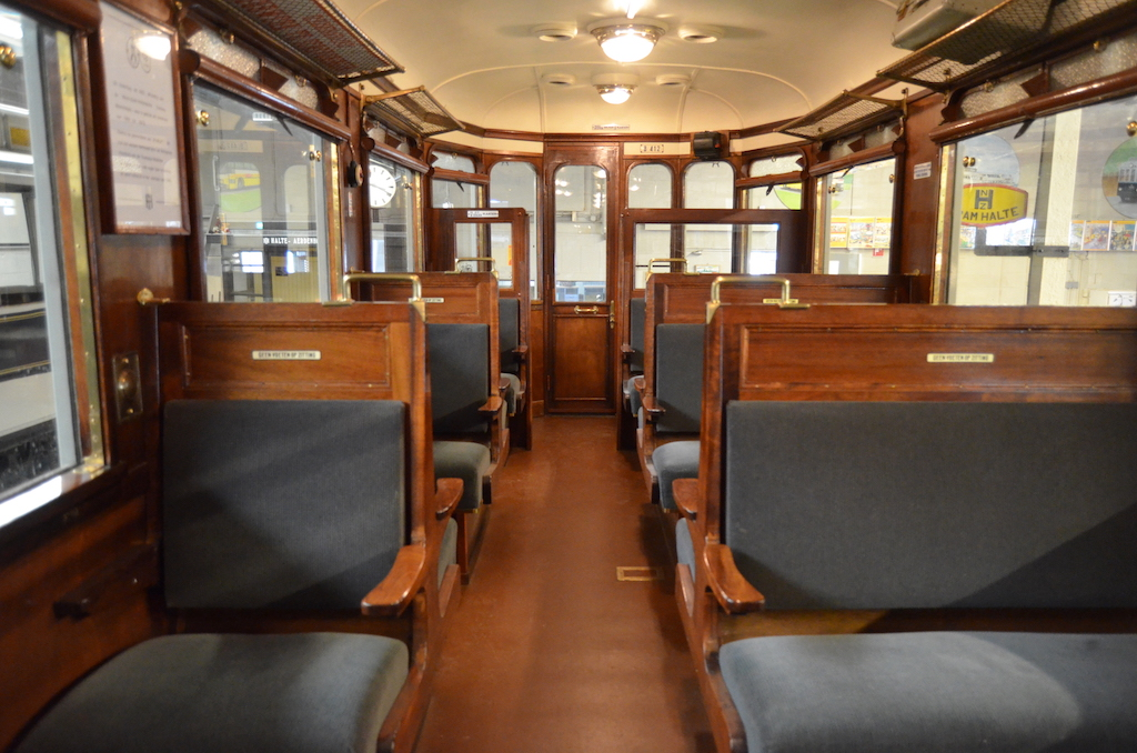 NZH-Vervoermuseum te Haarlem met het luxe interieur van de NZH B412. Foto: Erik Swierstra.